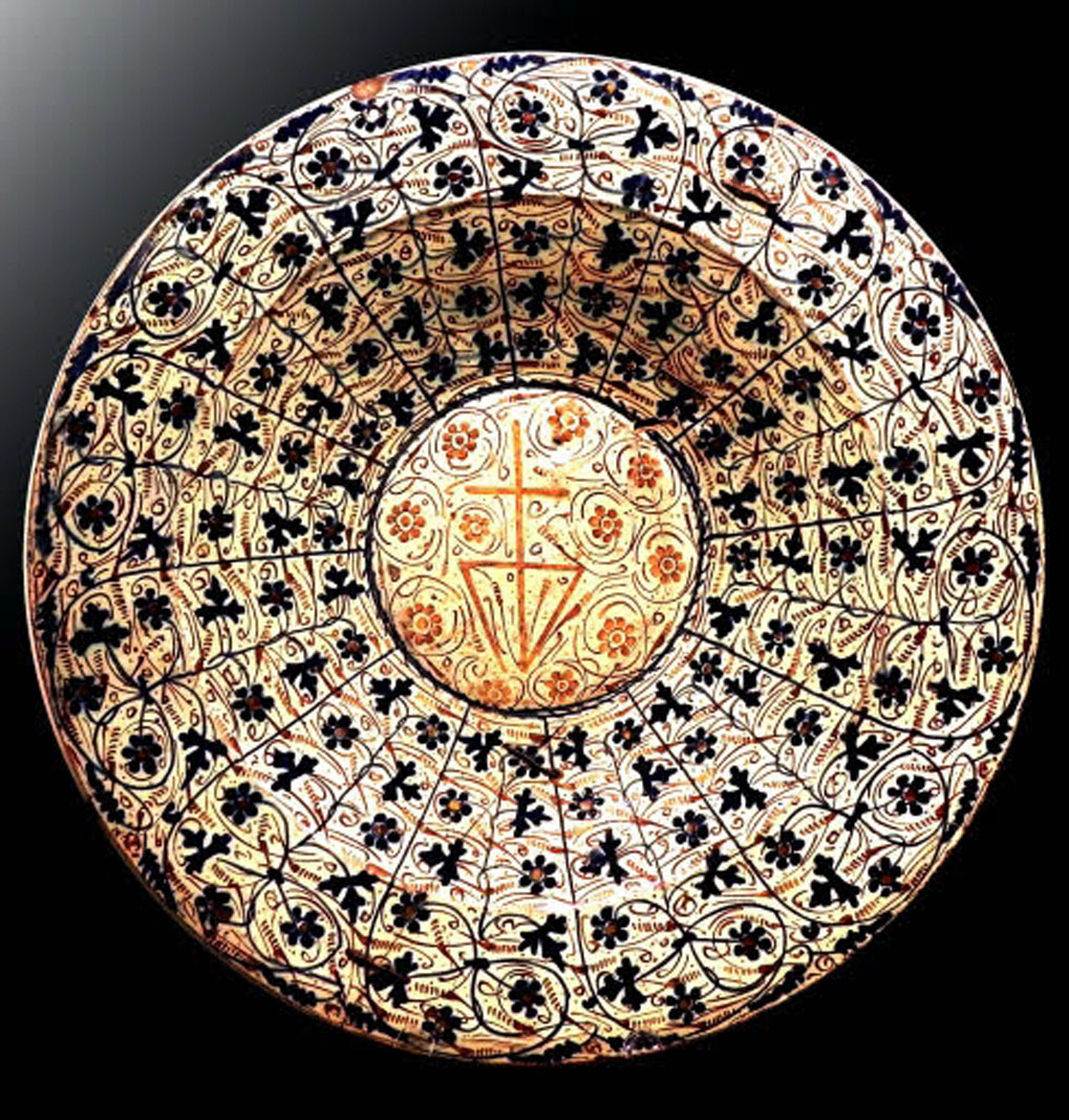 Plato de cerámica de Paterna autor anónimo del siglo XV. Conservado en el Museo de Cerámica de Barcelona. Spain